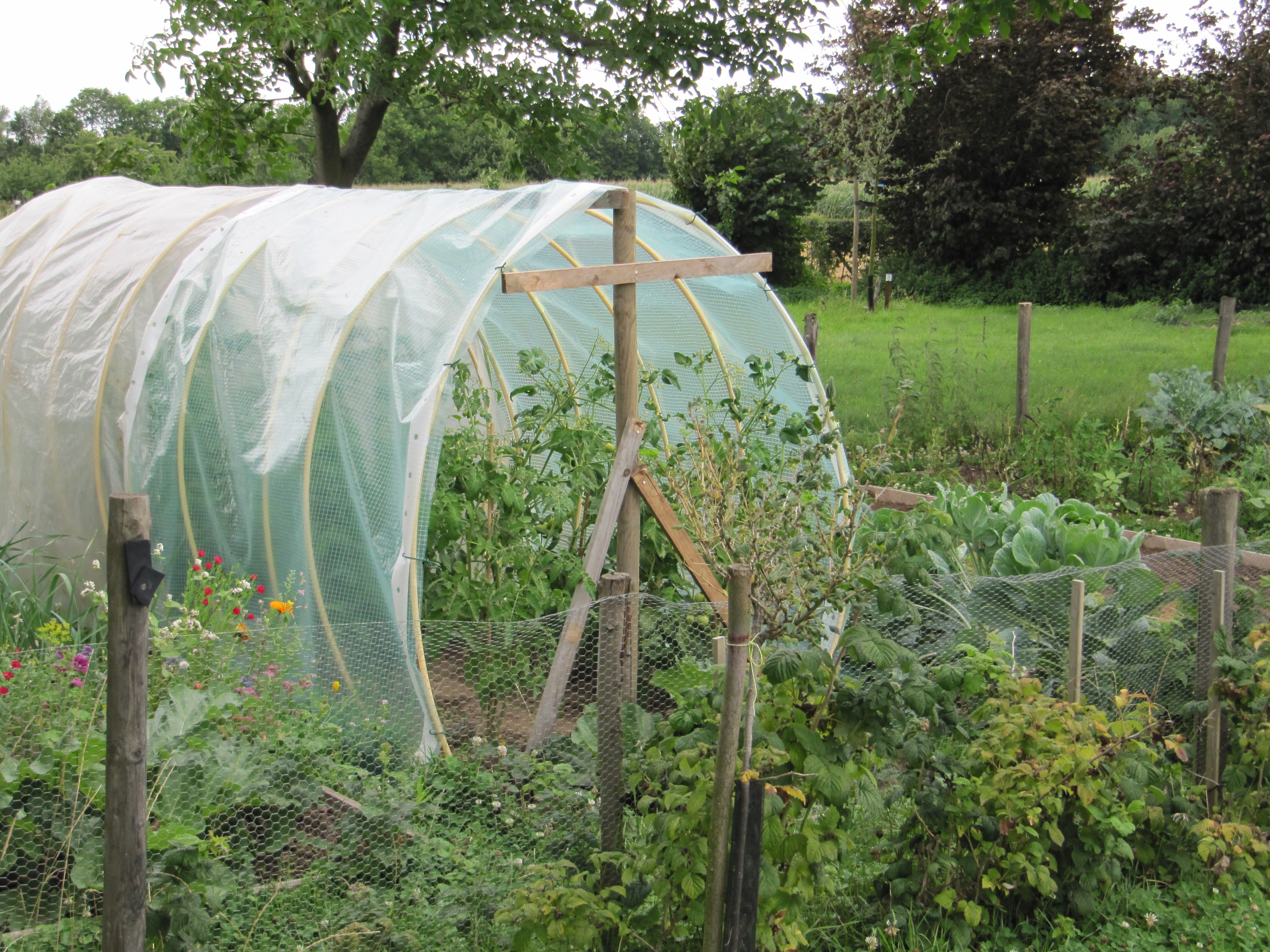 Tomatenkas met elektriciteitsbuis en versterkte plastic